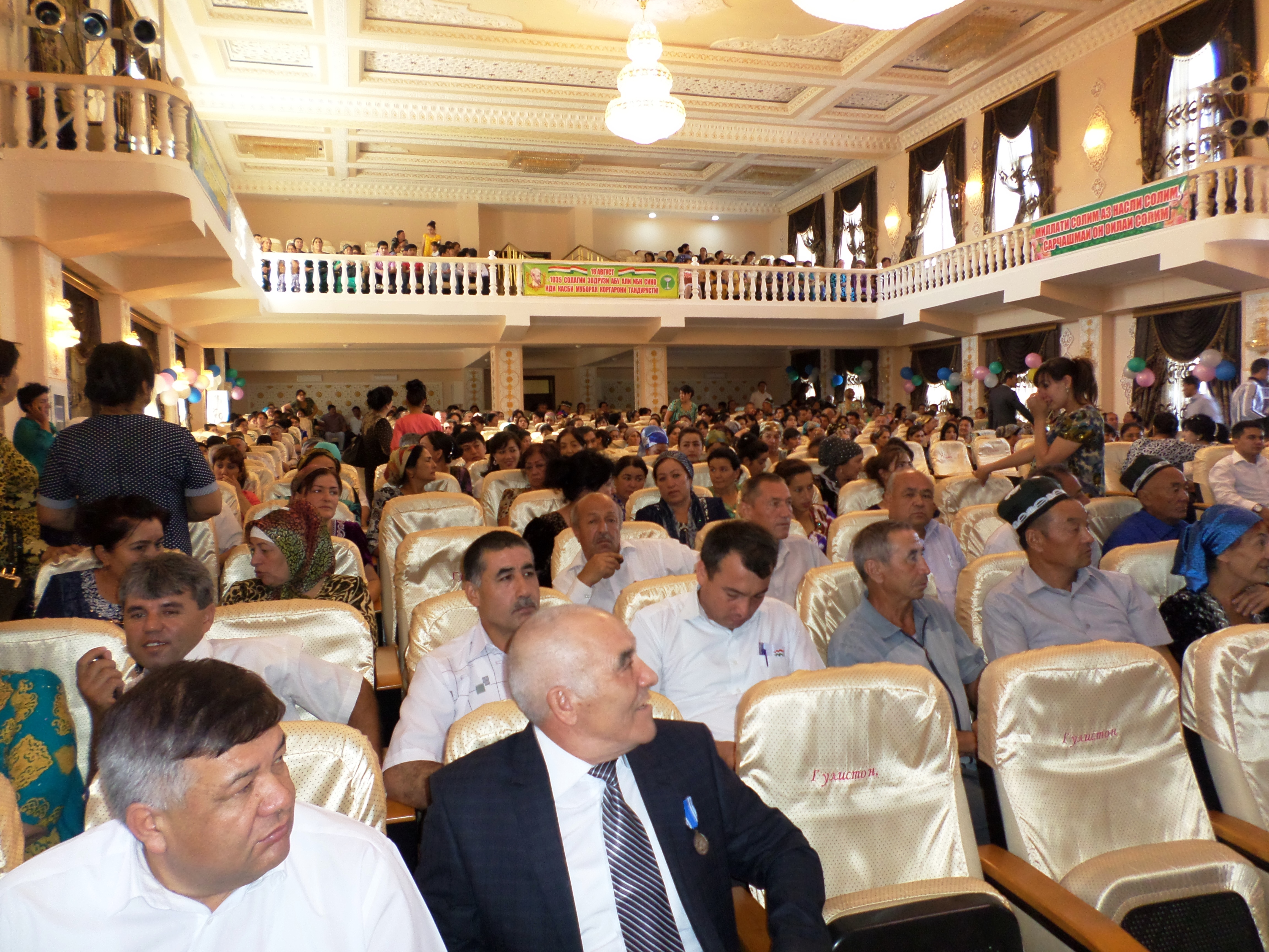 Мероприятие во Дворце культуры района Д. Расулова в Согдийской области, Таджикистан